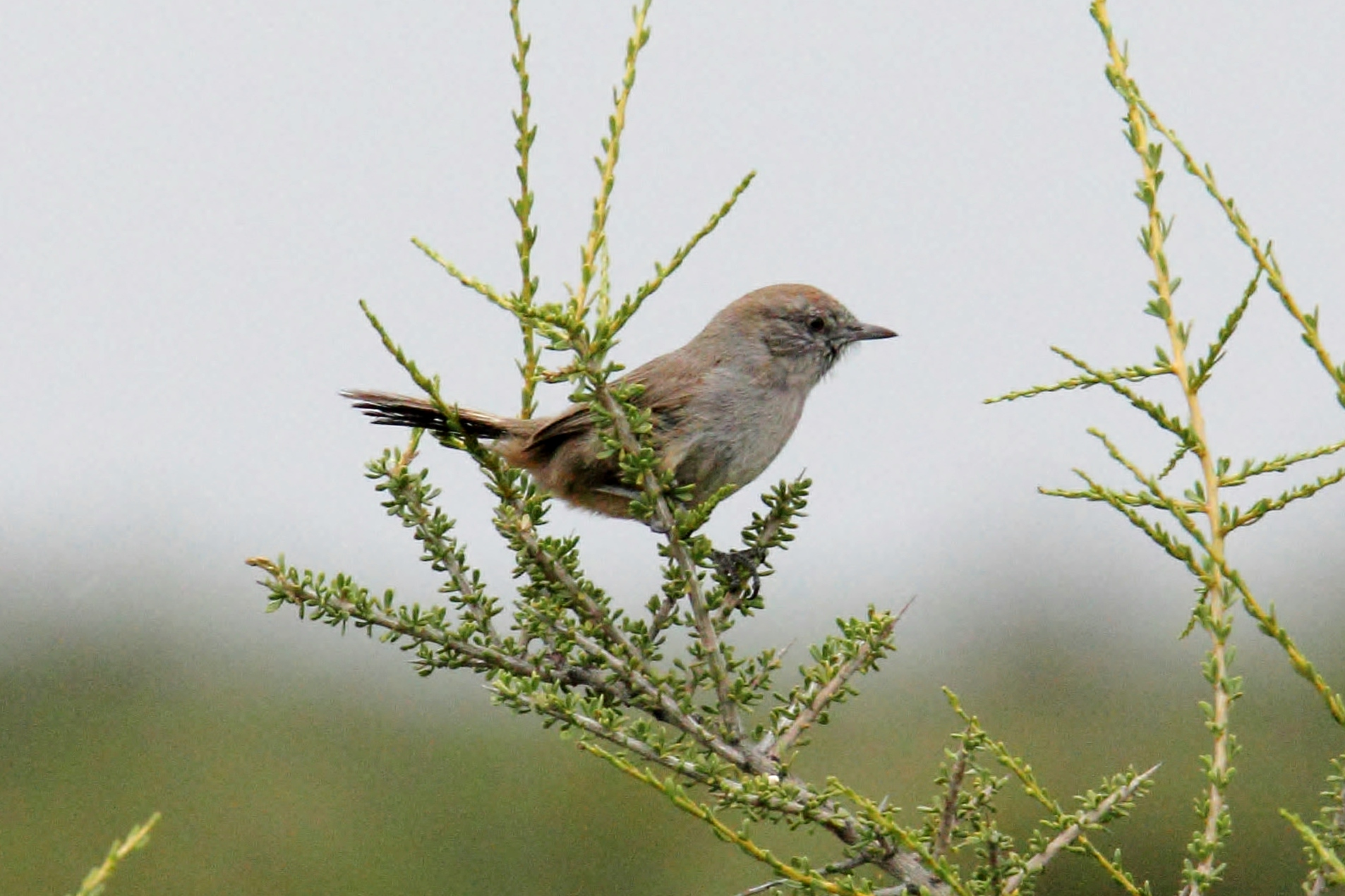 Patagonia Canastero (Pseudasthenes patagonica)